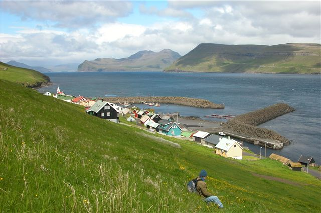 Hestur, Faroe Islands